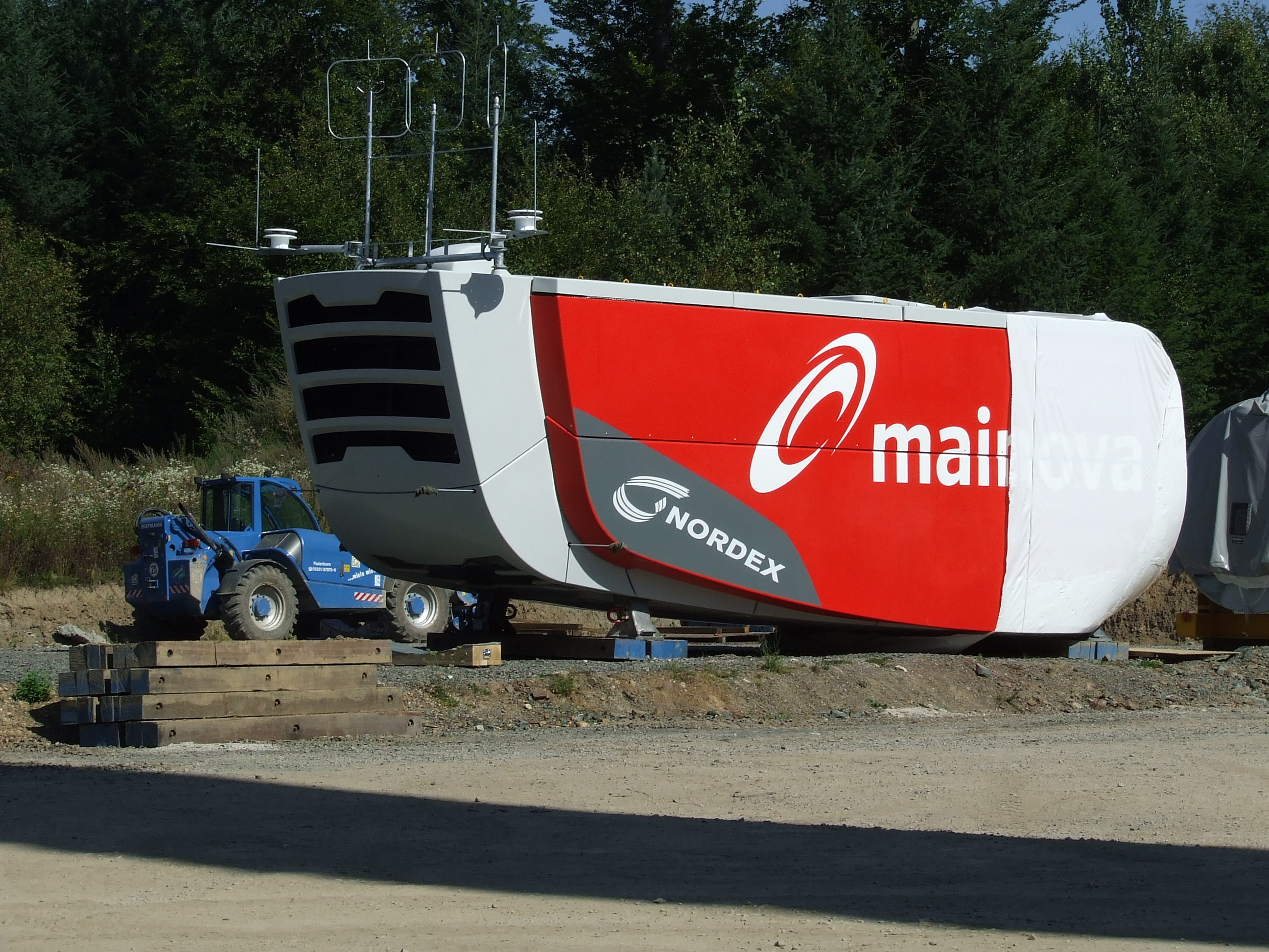 Noch teilweise verpacktes Maschinenhaus